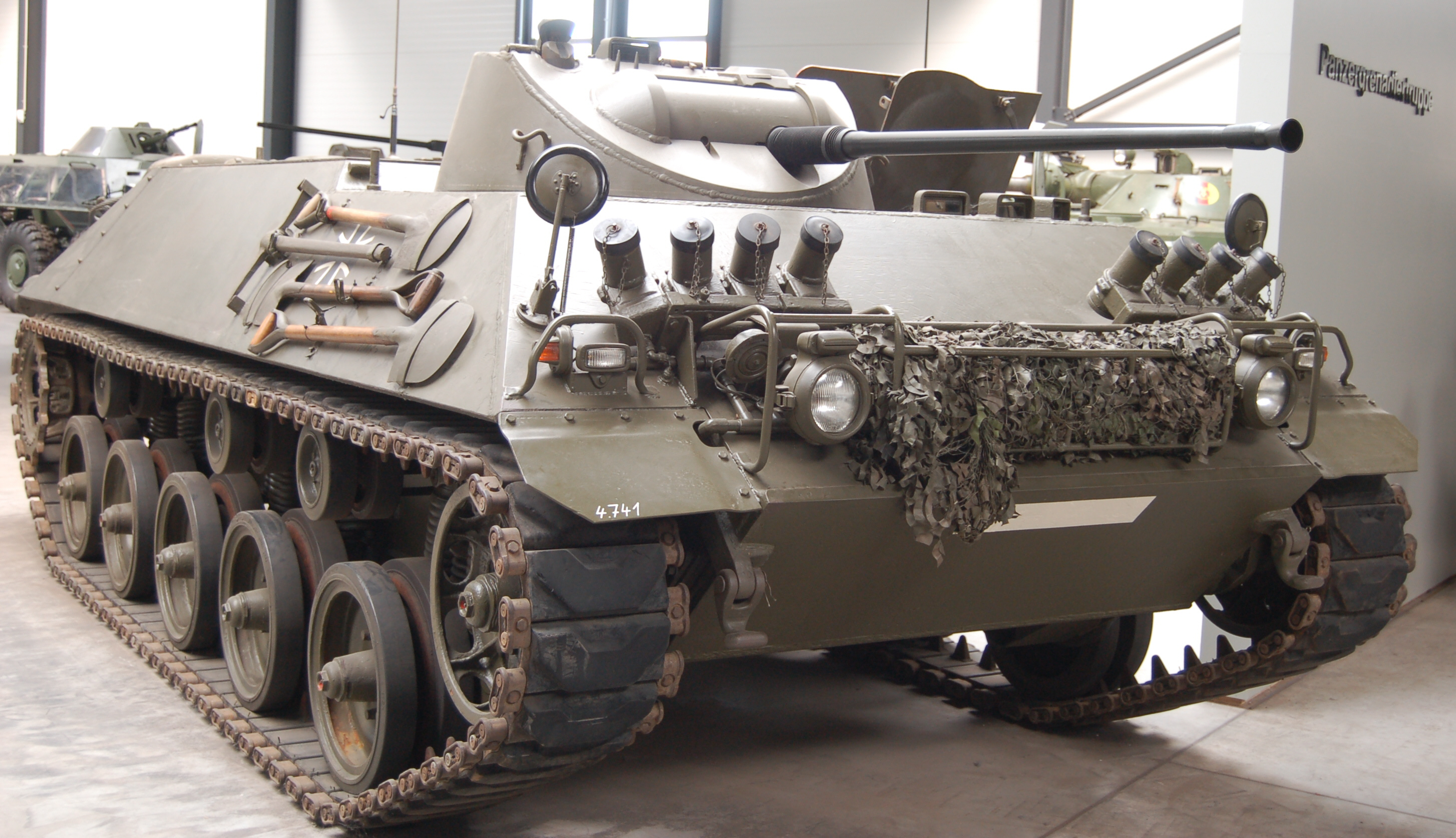 Schützenpanzer (lang) (Zugtrupp) „Hispano-Suiza HS 30“ Besatzung: 1 + 5 Soldaten Gewicht: 14,6 Tonnen Motorleistung: 168 kW (229 PS) Bewaffnung: 1 Maschinenkanone 20 mm L/85 und 1 MG 7,62 mm Baujahr: 1958–1962 Stückzahl: 2176